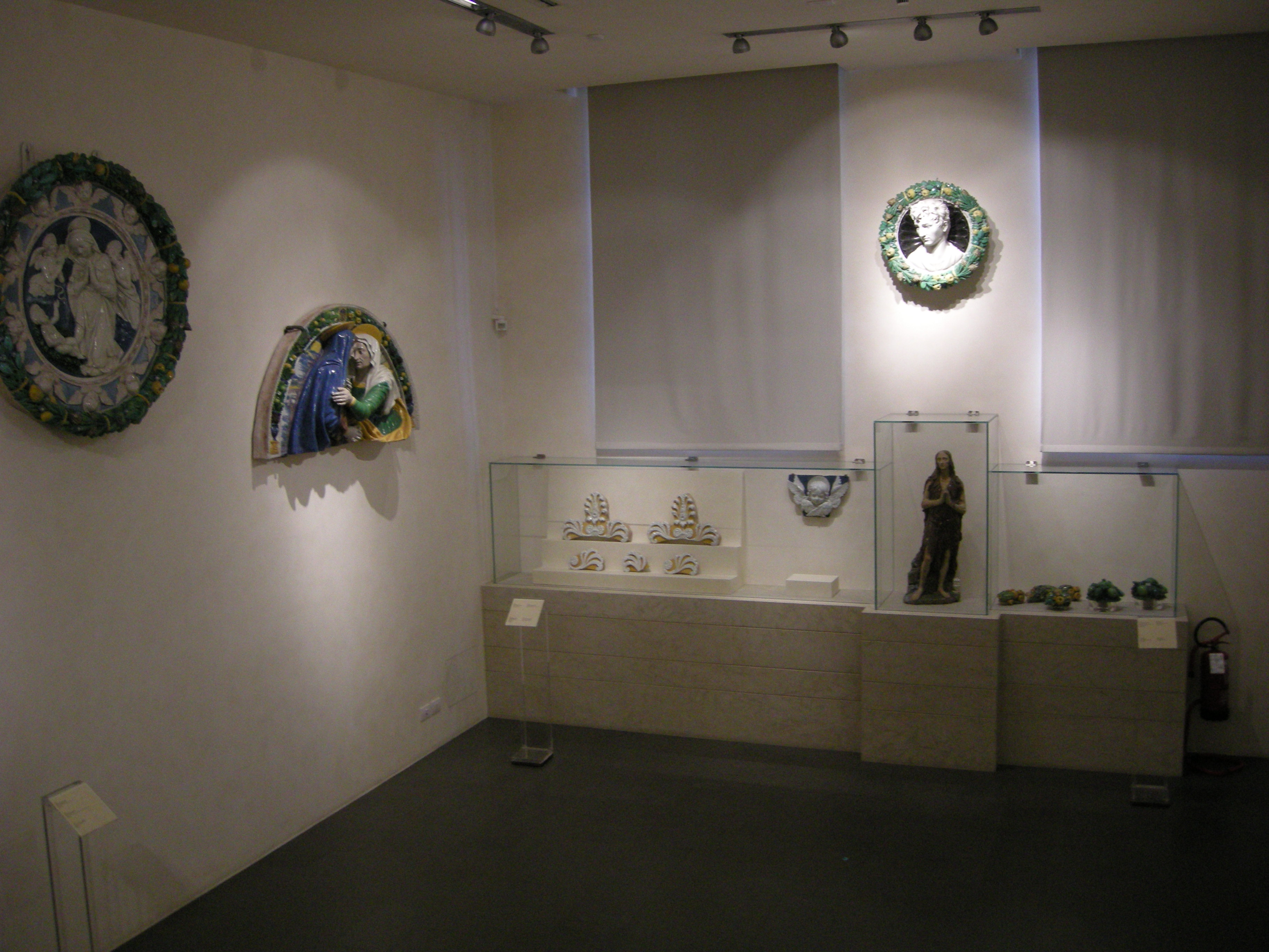 Museo bandini, sala della robbia